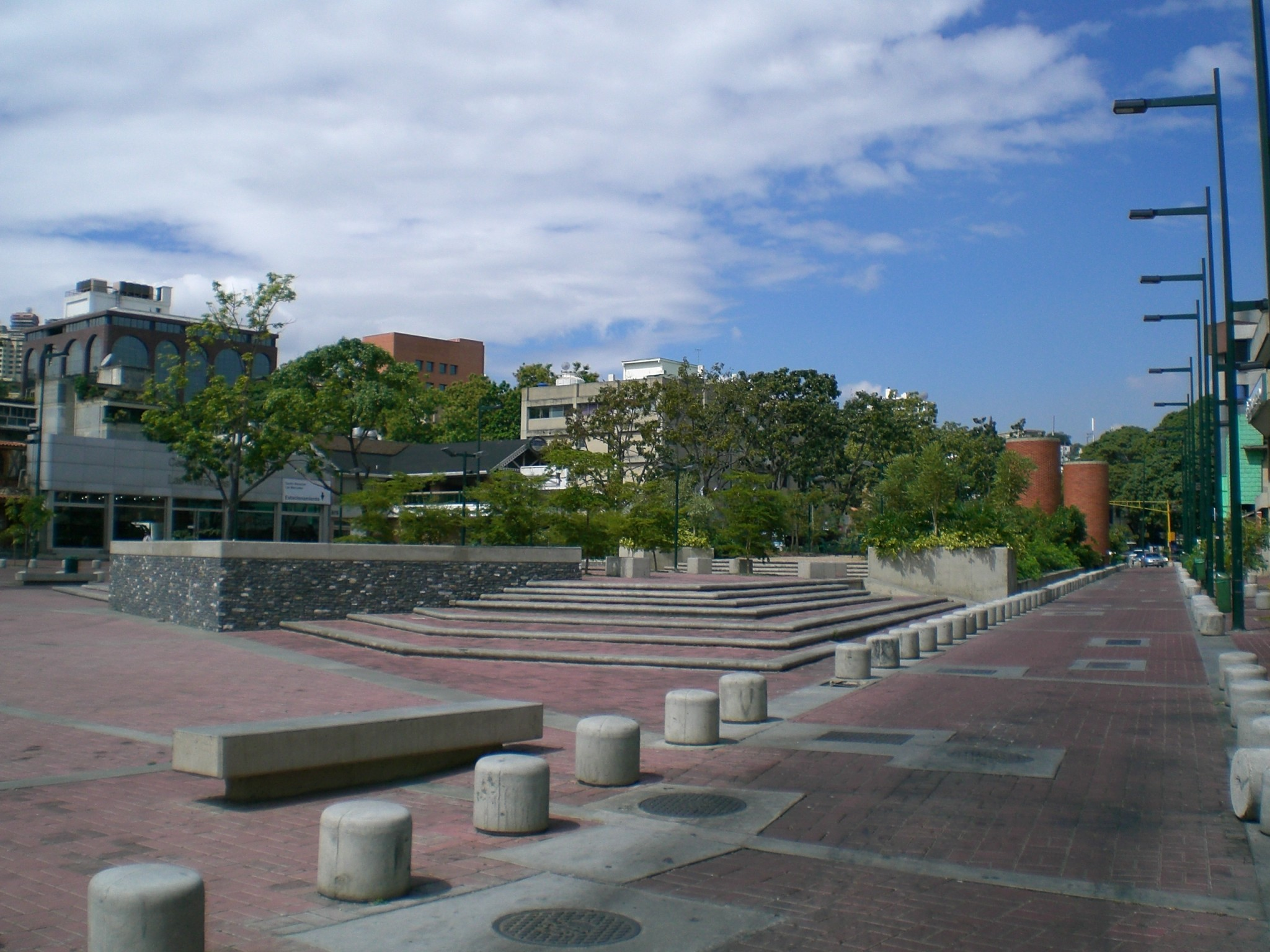 Plaza Alfredo Sadel, Baruta Municipality, Caracas.